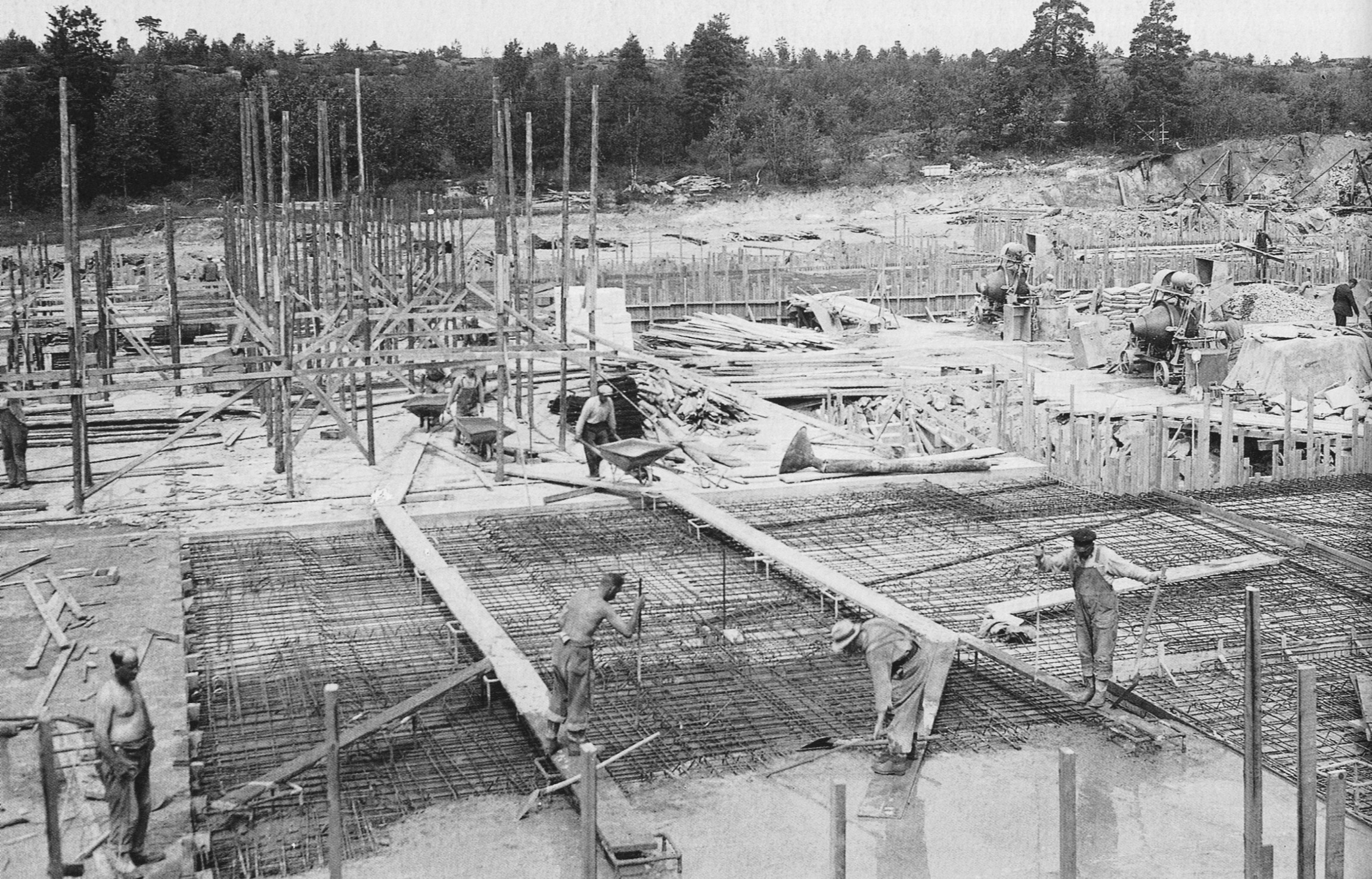 Byggplats LM Ericssons fabrik i Midsommarkransen